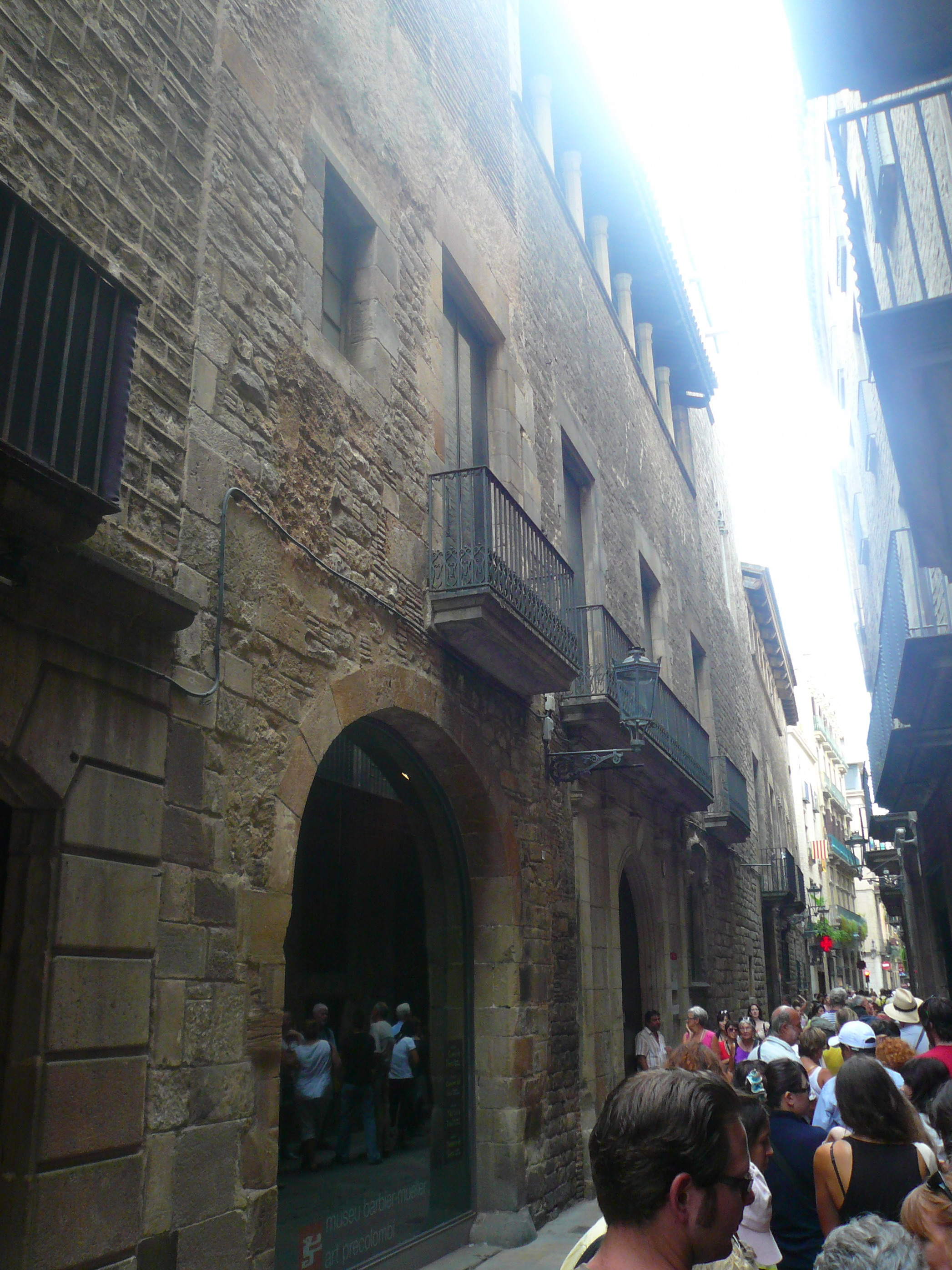 Palau Nadal (Barcelona)